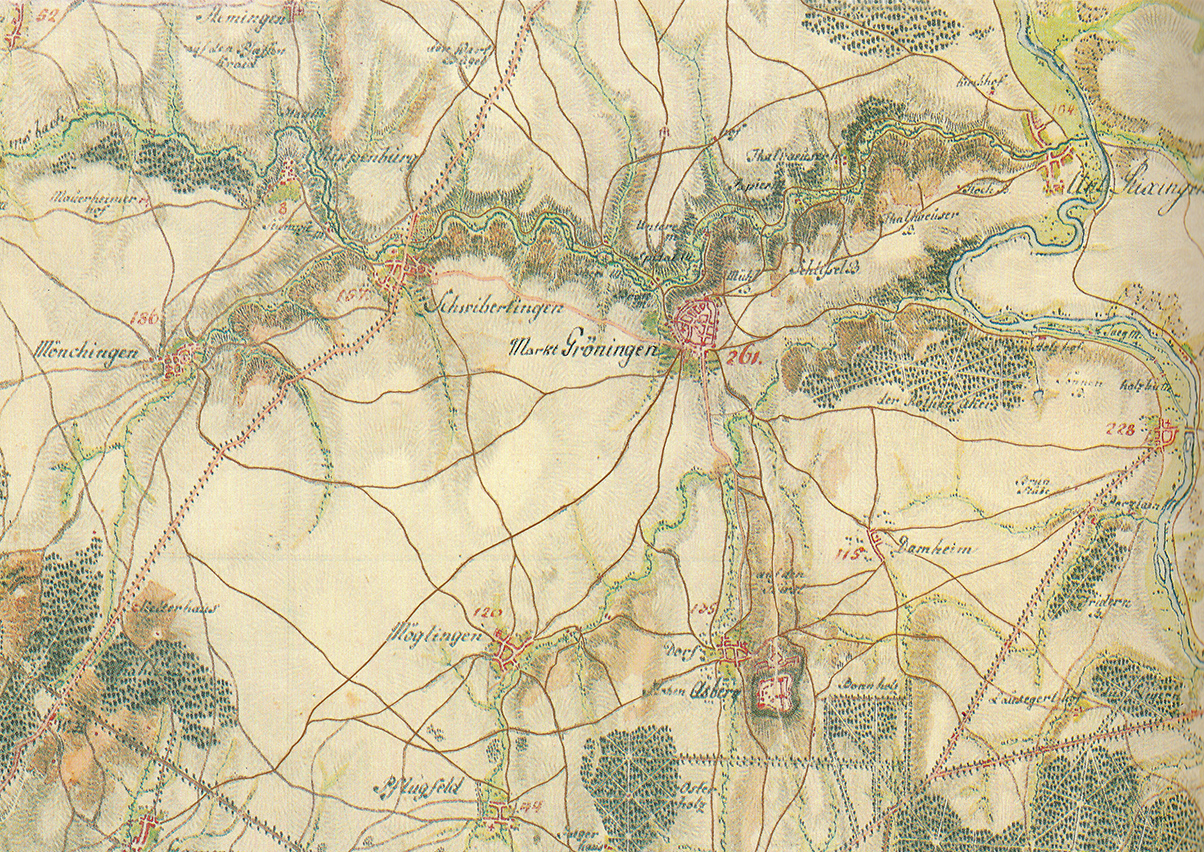 "Markt Gröningen" auf einem Ausschnitt der Schmitt'schen Karte von Südwestdeutschland Nr. 62 von 1797, nachgedruckt vom Landesvermessungsamt Baden-Württemberg, Stuttgart 1987